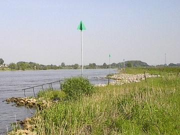 Groene betonning aan de IJssel bij Hattem, eigen foto